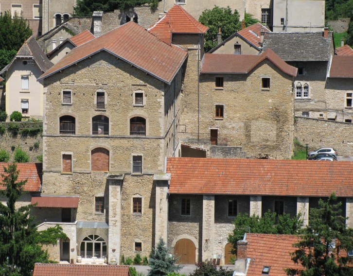 Crémieu (Isère) : ancienne filature de lin, bâtiment sans affectation actuellement - vue depuis la colline Saint-Hippolyte